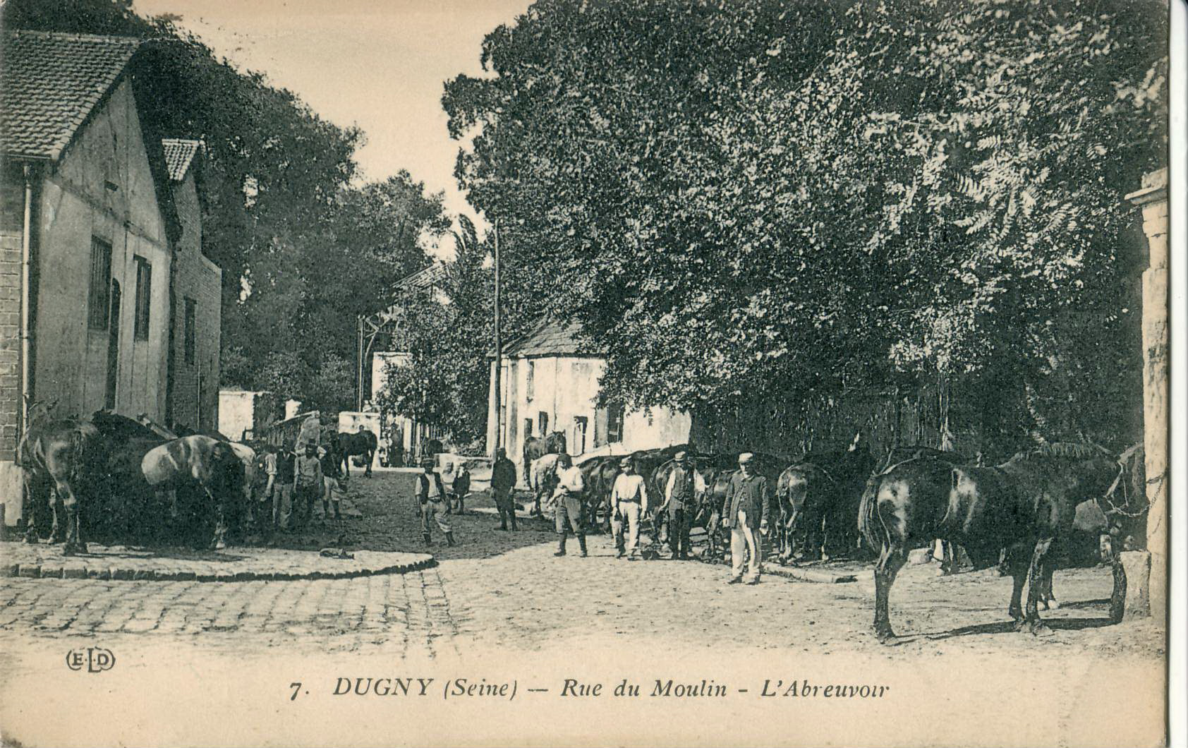 Carte postale ancienne éditée par ELD N°7 DUGNY : Rue du Moulin - l'Abreuvoir